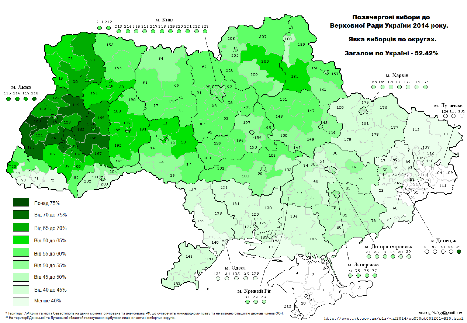 Явка виборців на виборах до ВРУ 2014 по округах